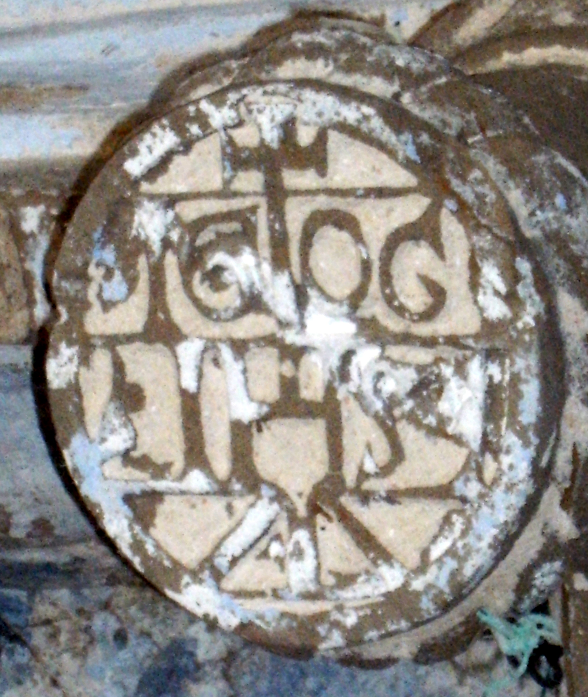 Detalle de la bóveda gótica